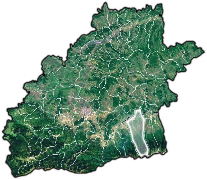 Porumbacu de Jos jud Sibiu.